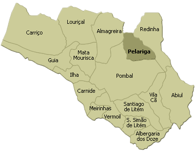 localisation de pelariga dans la freguesia de pombal